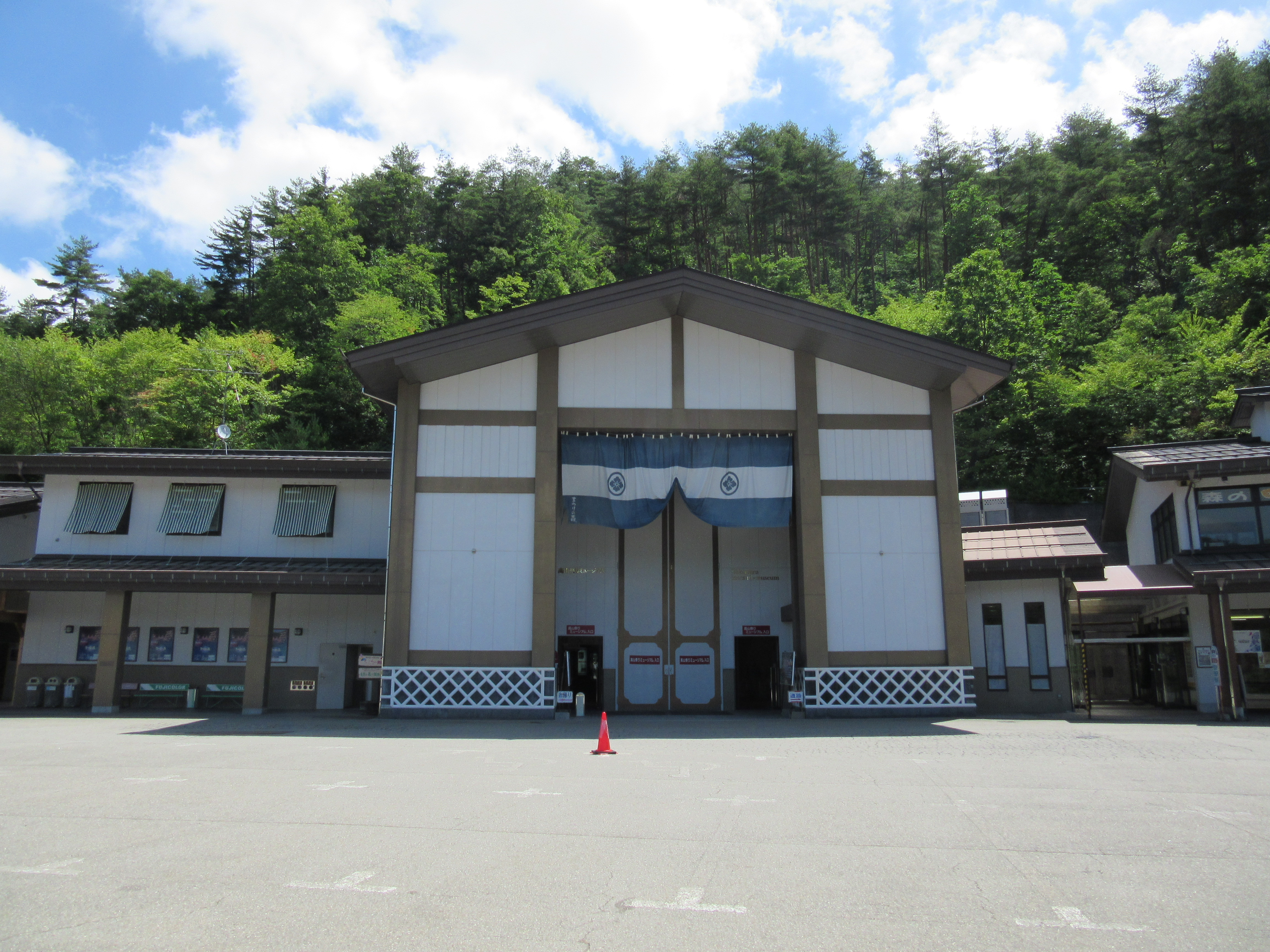 飛騨高山まつりの森